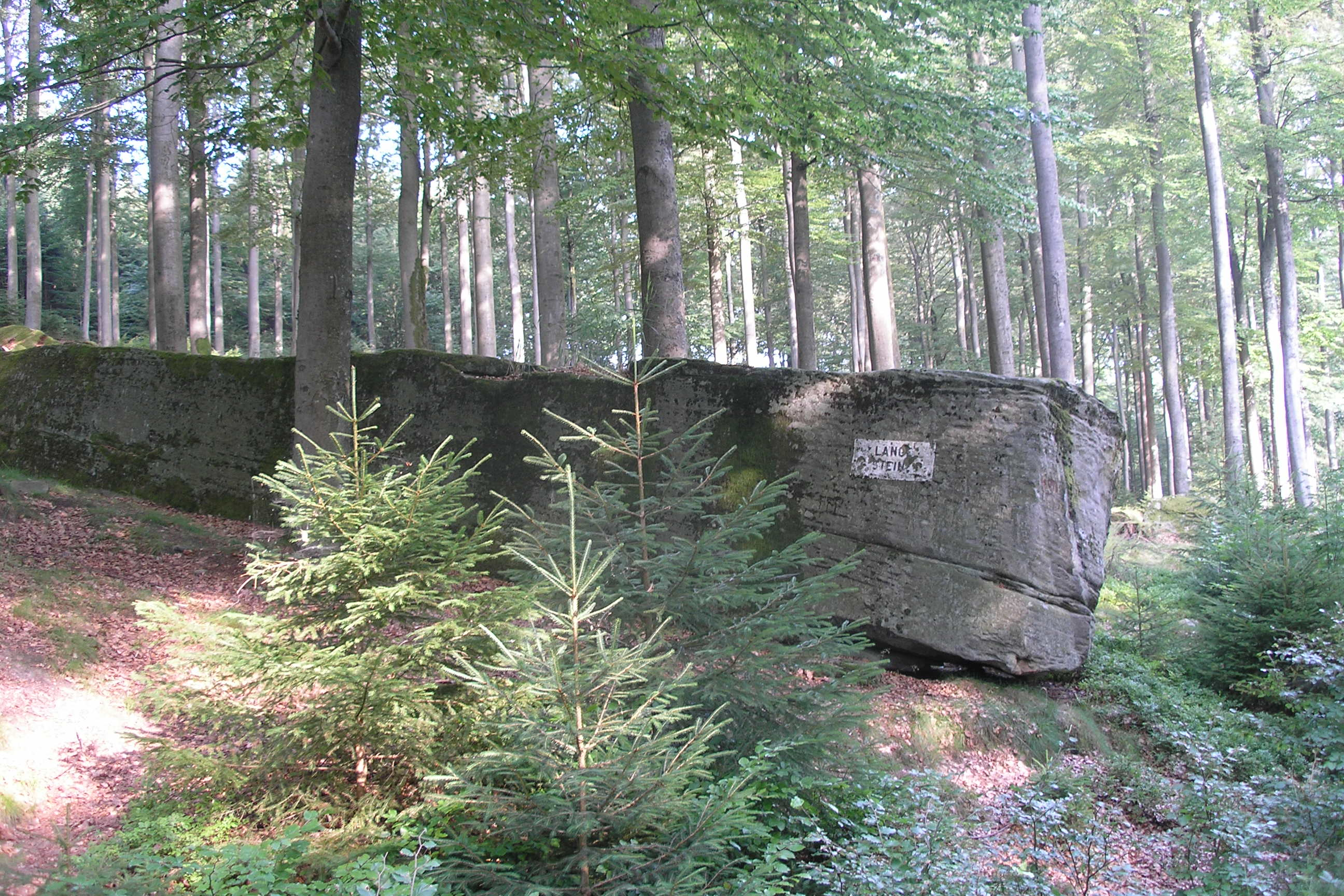 Geotop Lange Steine beim Röderhof/Riedenberg